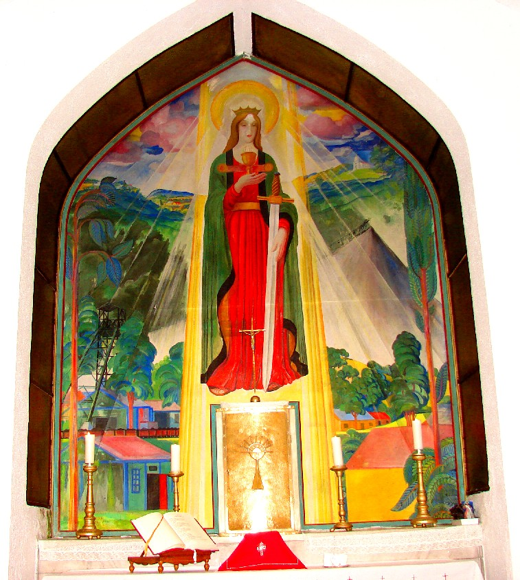 Szent Borbála templom főoltár festménye (Csolnok, Komárom-Esztergom megye). A festmény bal oldalán lent az aknatorony látszik, fent a Gete-hegy, a kép jobb felső részén maga a Szent Borbála templom van a hegyen, jobbra egy meddőhányó látszik, a középpontban Szent Borbála, a bányászok védőszentje a karddal.